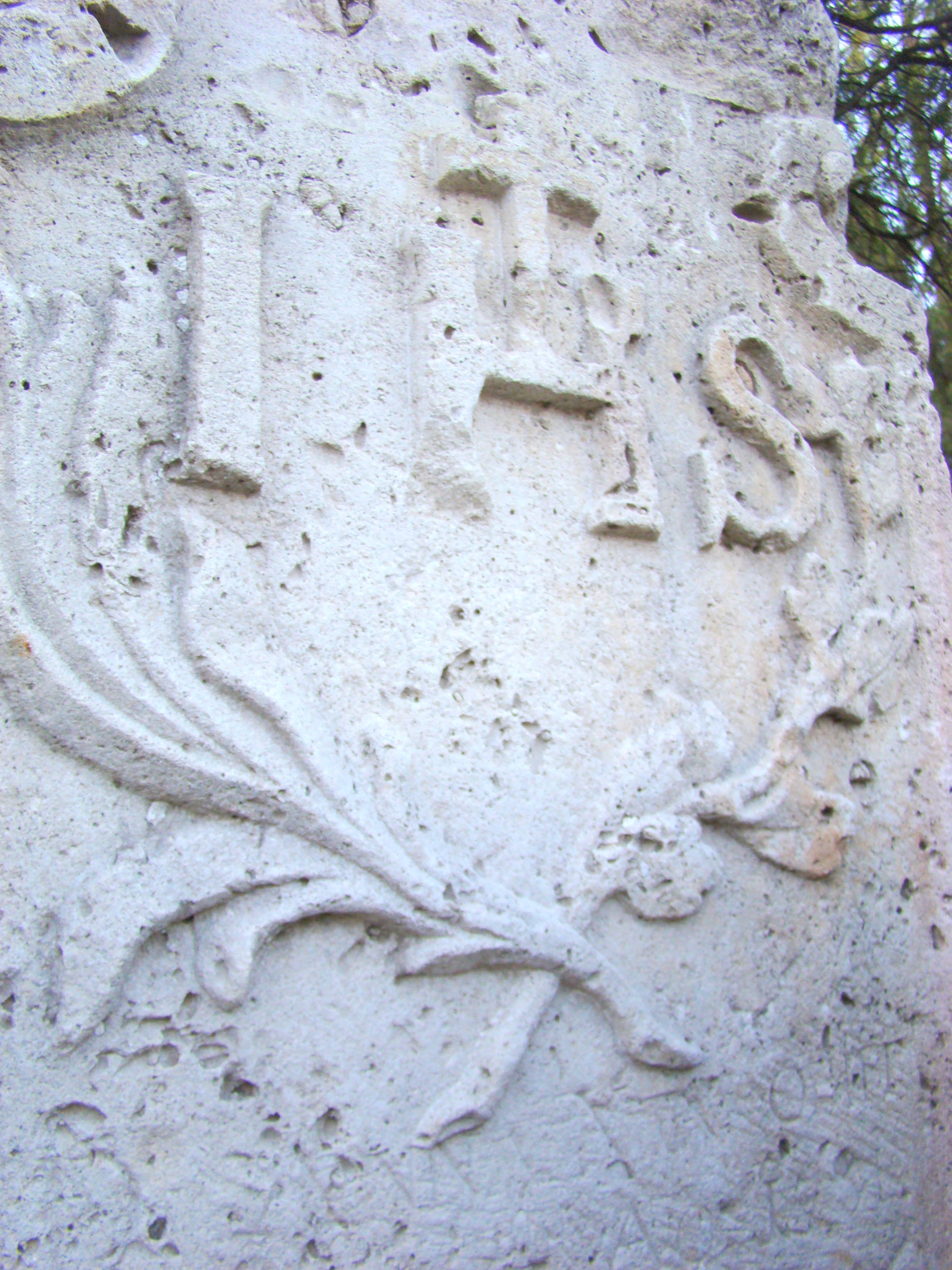 Biserica "Pogorârea Sfântului Duh", sat OSTROV; comuna RÂU DE MORI 01